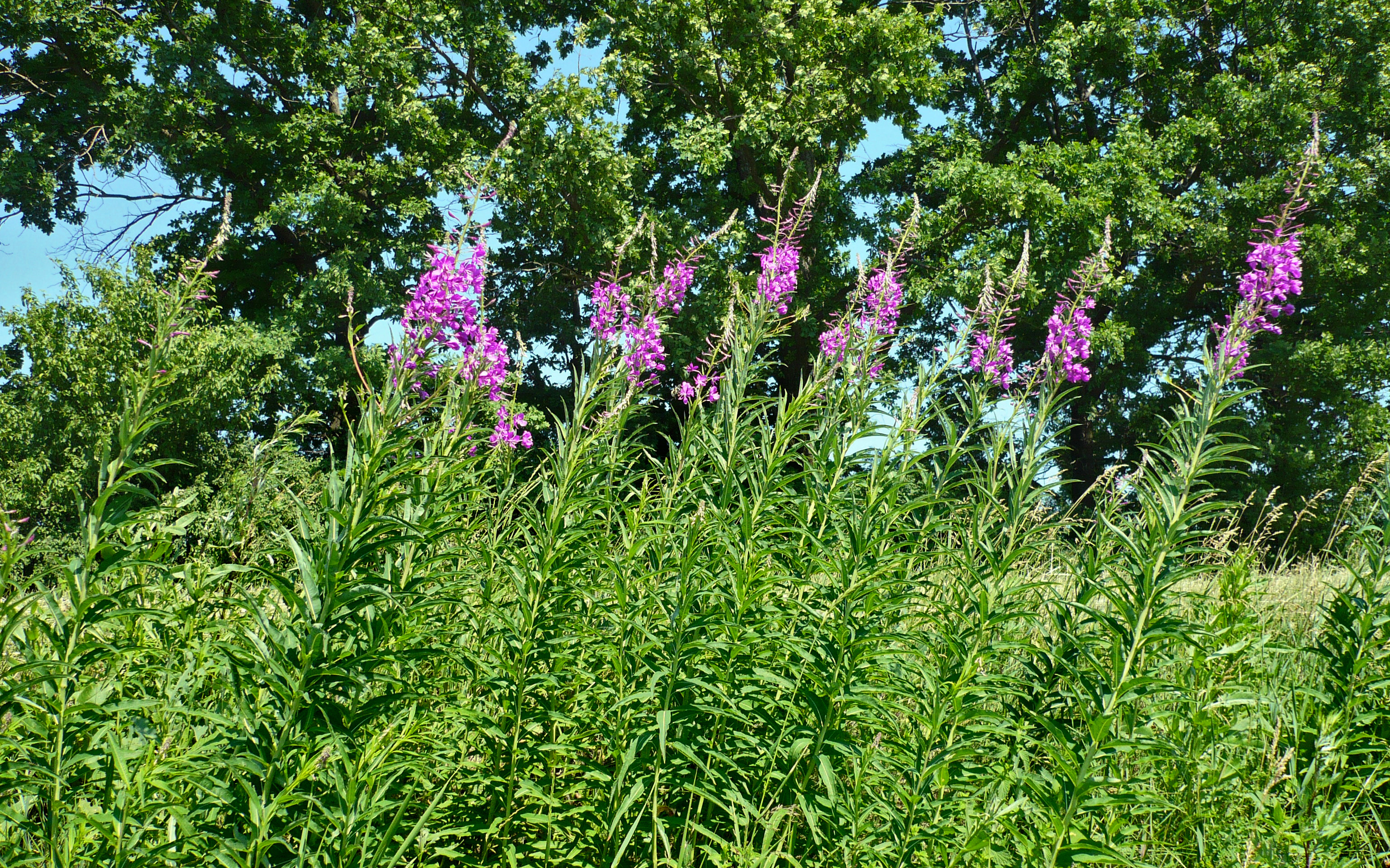 Иван-чай. Село Поляна, Шебекинский район Белгородской области.